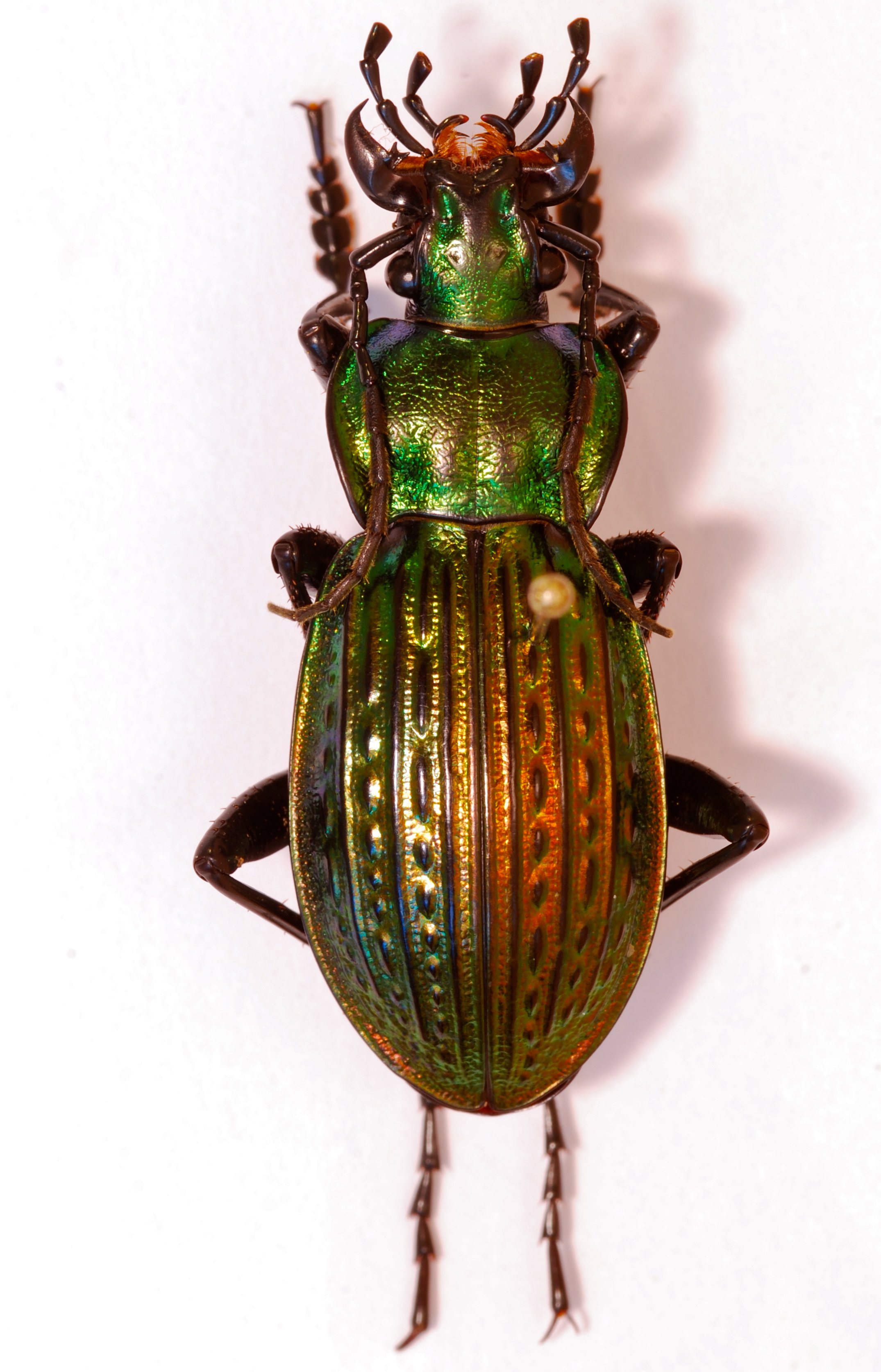 Gernik, SW Banat, ROMANIA